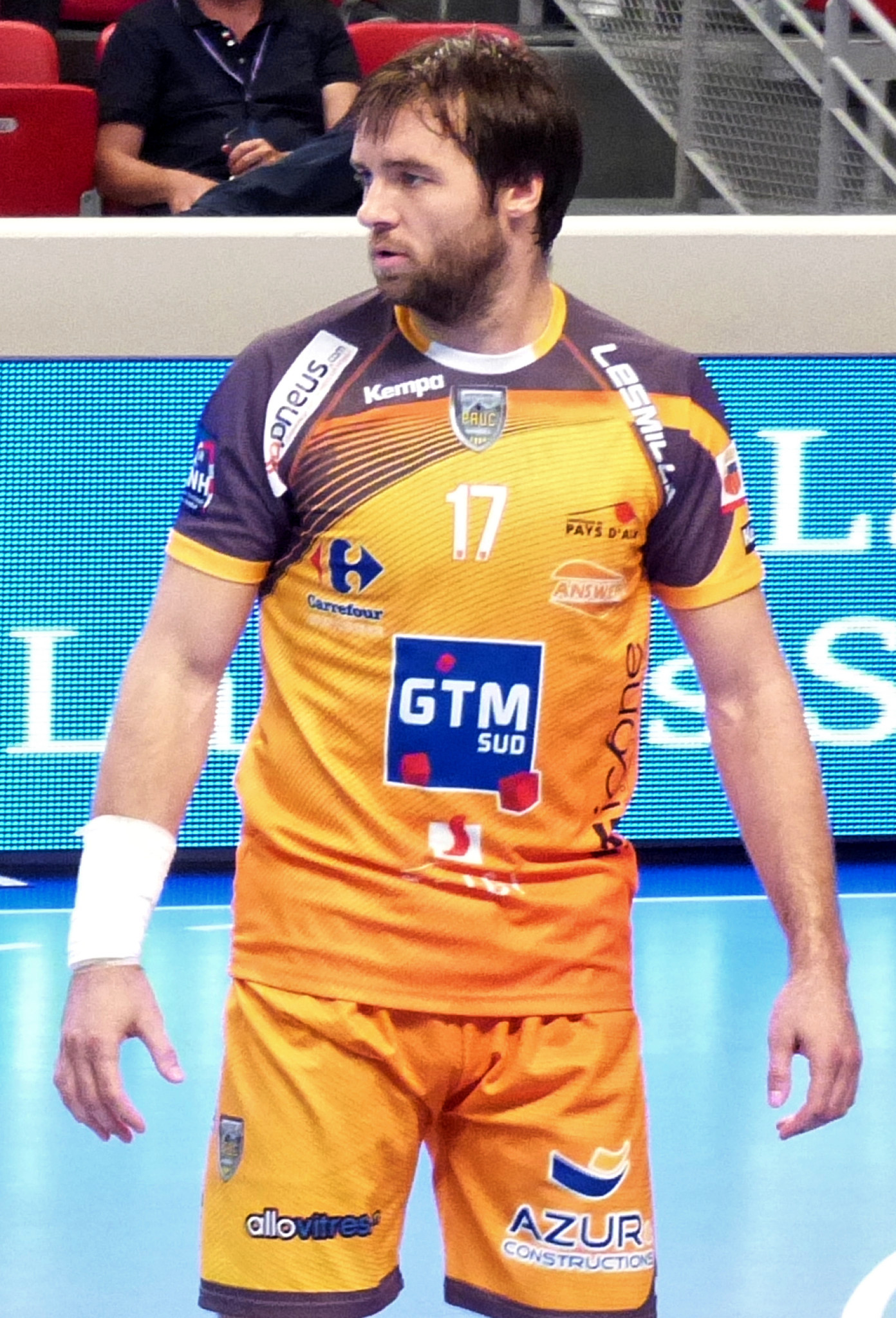 Rencontre entre le PSG Handball et Pays. A Coubertin, le 11 septembre 2014.